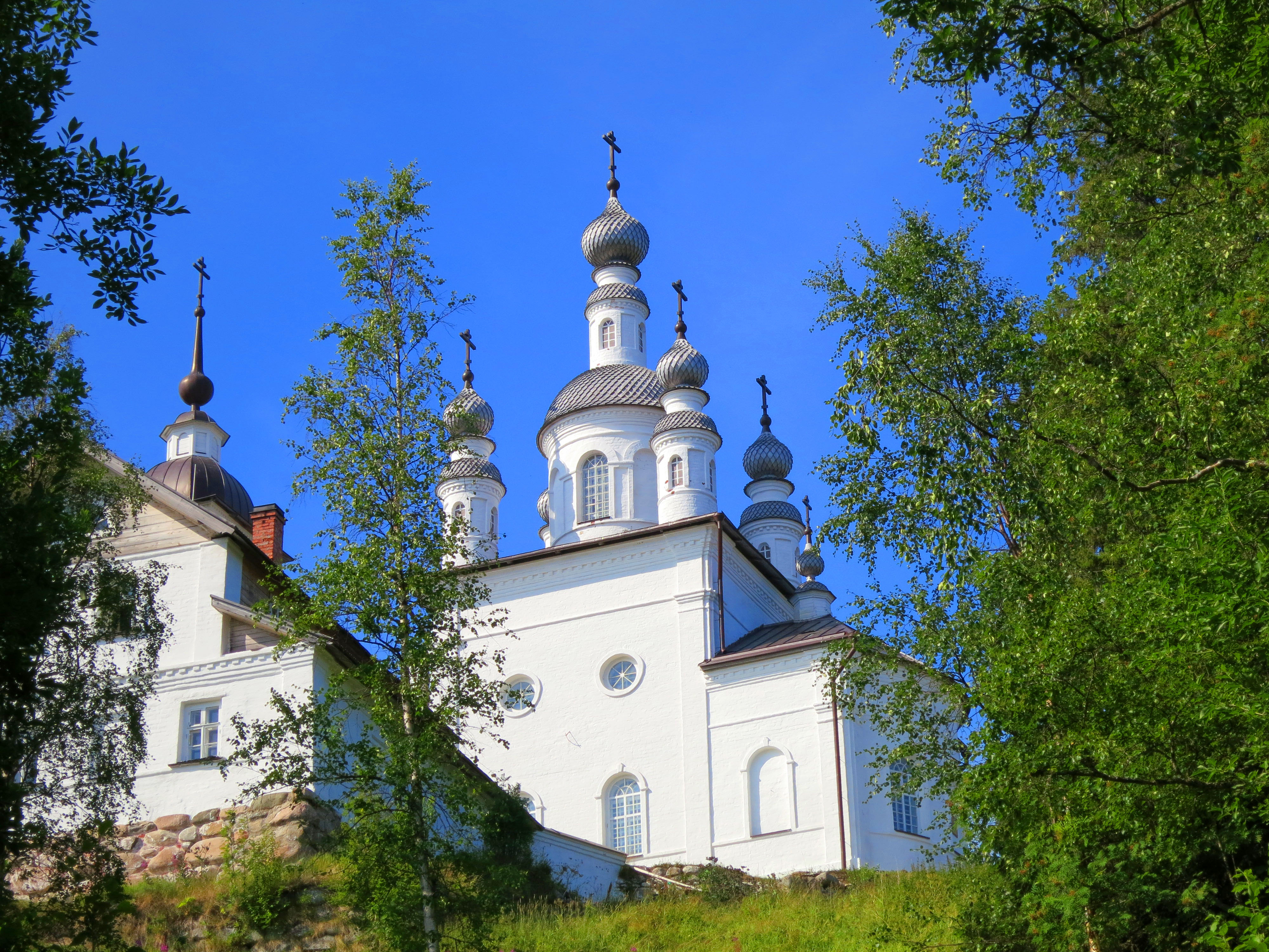 NAME? (Архангельская область, Архангельск, остров Большой Соловецкий)